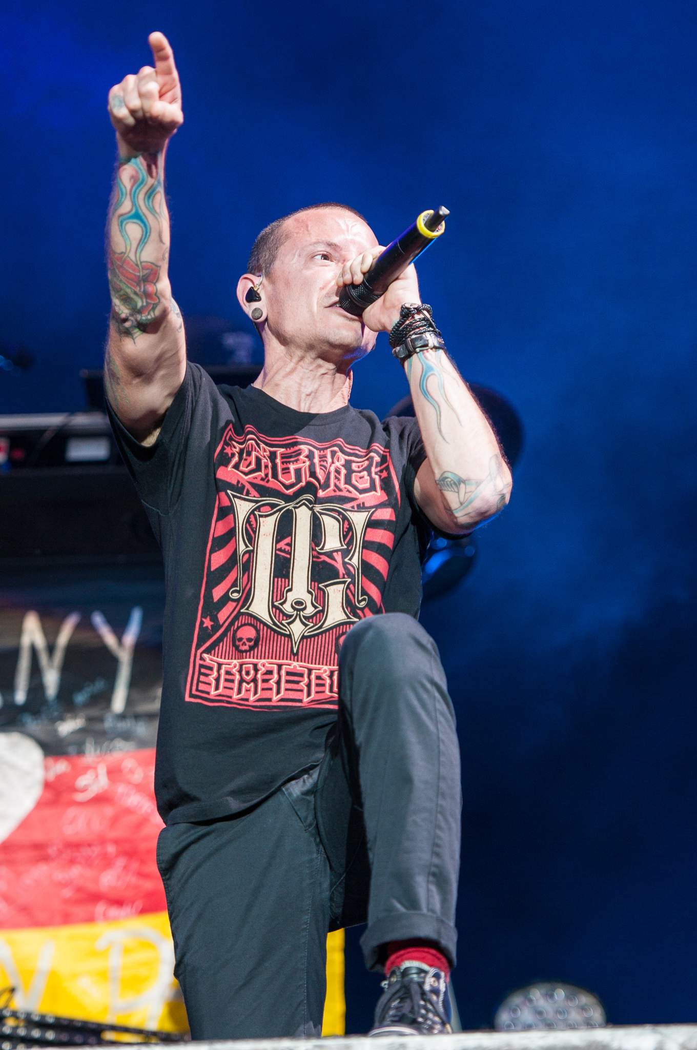 ARGO-Konzerte,Centerstage,Chester Bennington,Konzert,Linkin Park,Livekonzert,Livemusik,Musik,RiP,Rock im Park 2014